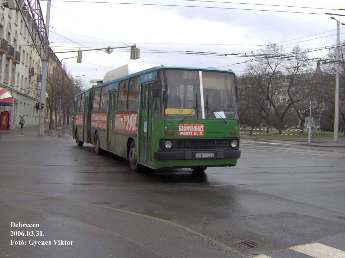 31-es jelzésű Ikarus 280 metánbusz Debrecenben (frsz. GEX-433)